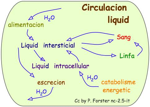 Circulacion dels liquids dins l'organisme uman